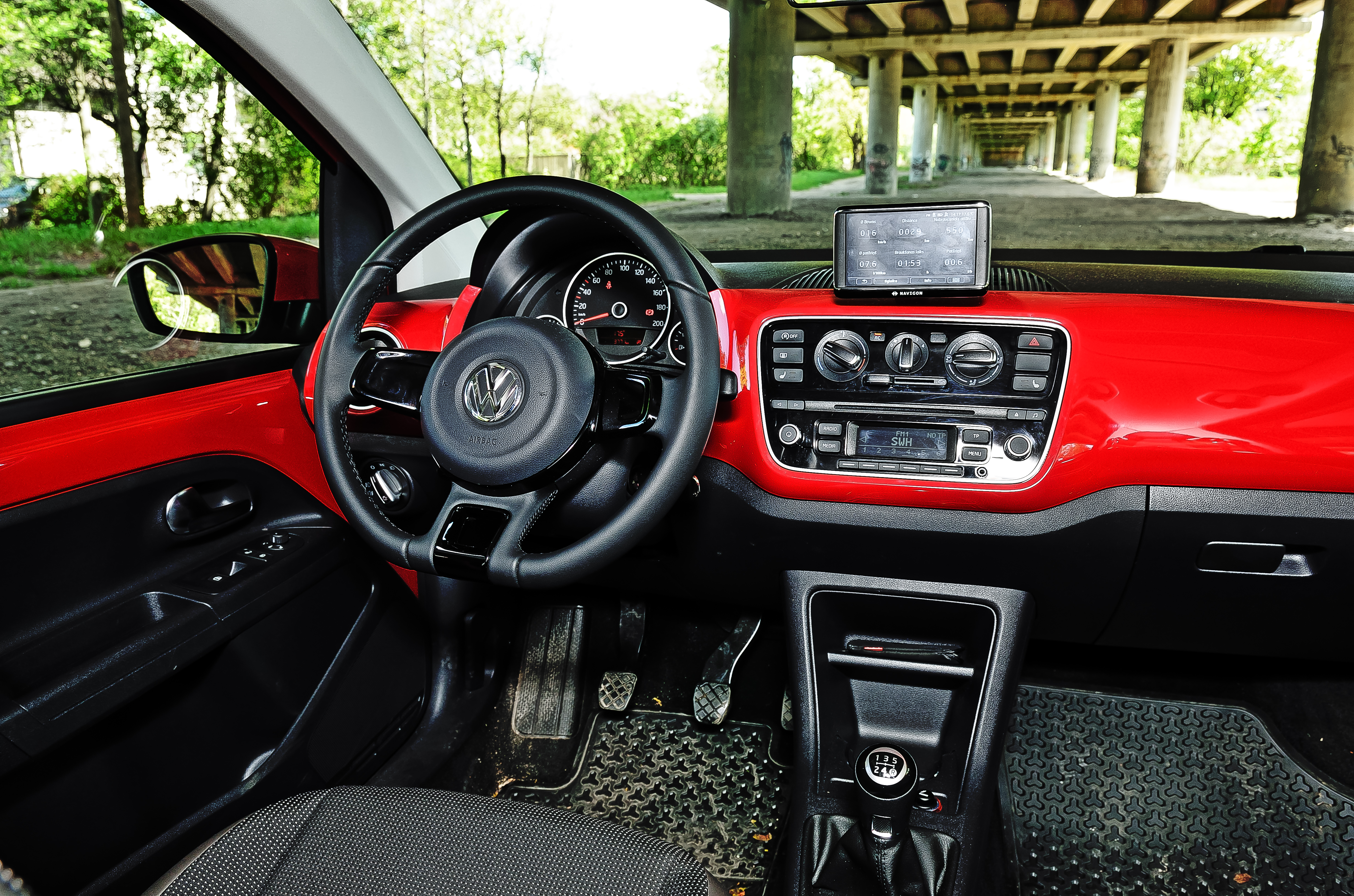 Attribution: Kaspars Garda, garda.lv